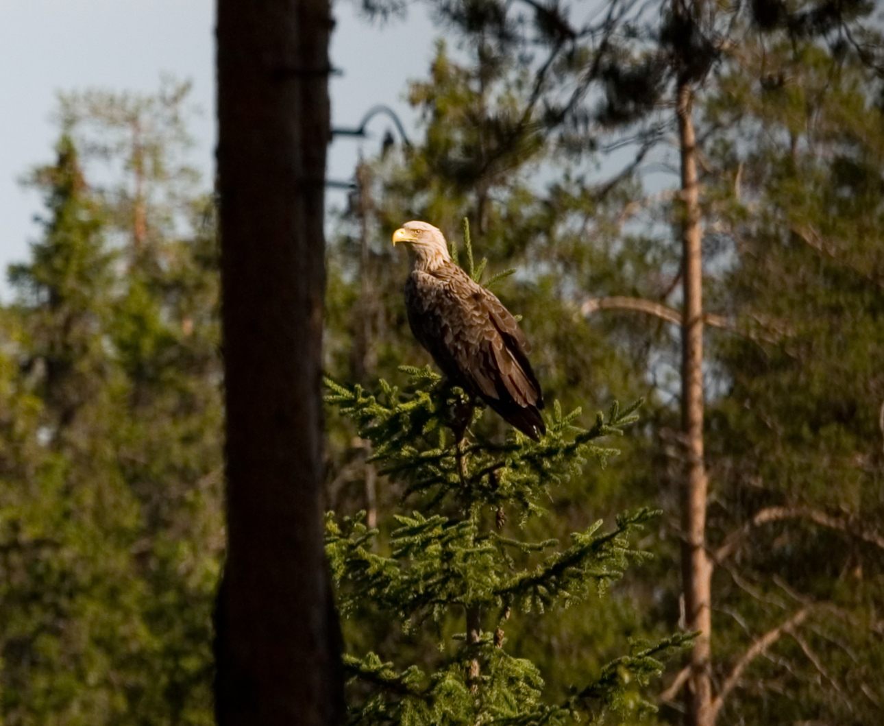 Haliaeetus albicilla